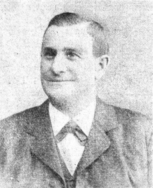 Österreichischer Politiker, Reichsratswahl 1907, Name siehe Dateiname